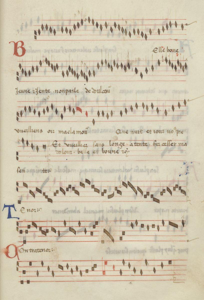 Paris, Bibliothèque Nationale, fonds nouv. acq. français 4917